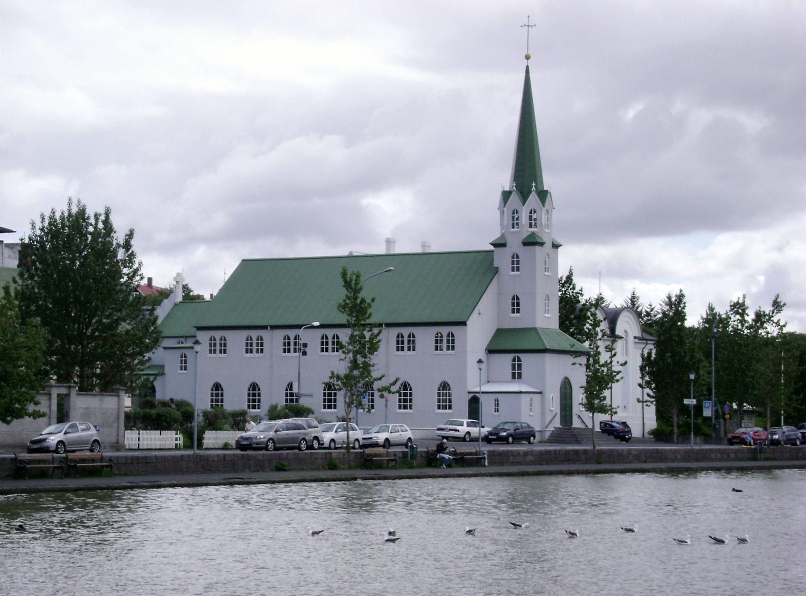 Fríkirkjan í Reykjavík. Reist árið 1902. Arkitekt: Rögnvaldur Ólafsson (d. 1917)